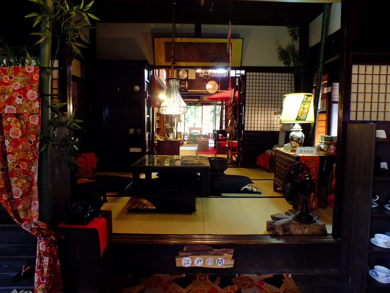 Edoshinden Company（丹波篠山江戸親伝）篠山市乾新町